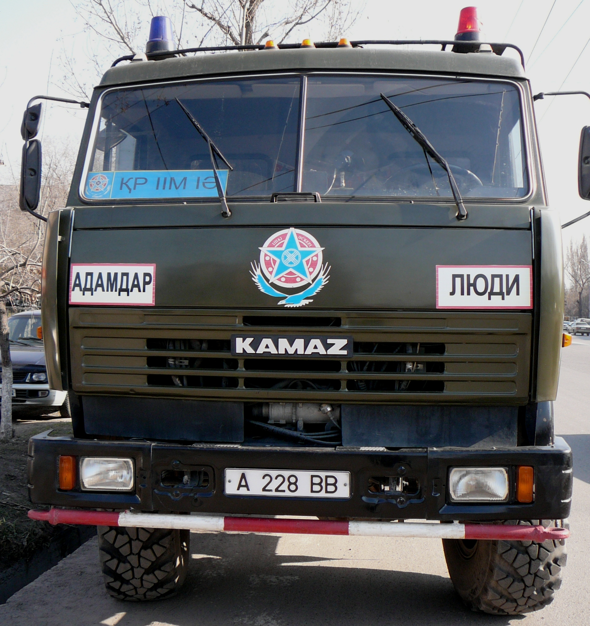 Номер автомобиля Внутренних Войск Республики Казахстан. Камаз-43118 1-ой Бригады Внутренних Войск МВД РК. "А" - г.Алматы.